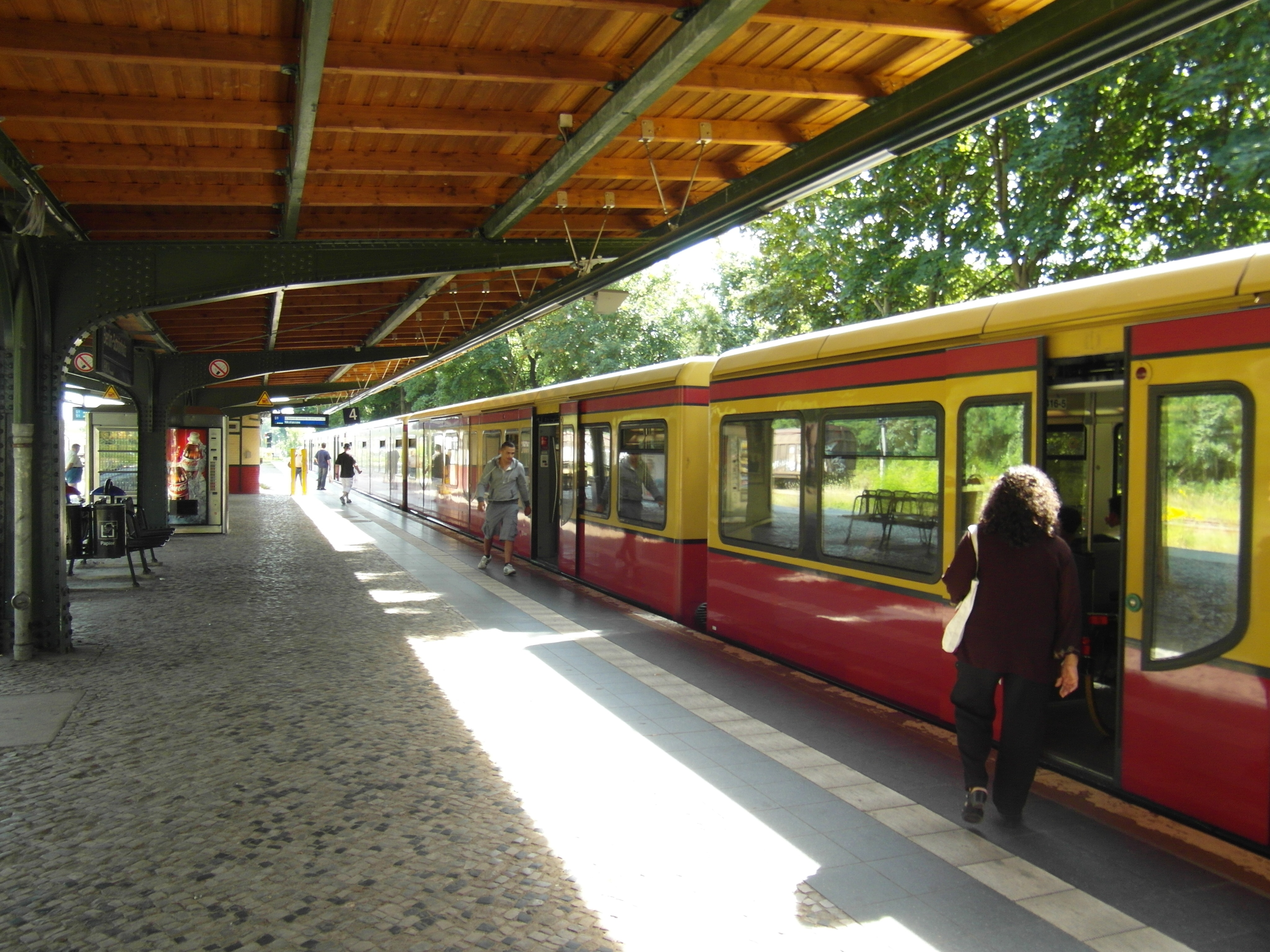 Linien S1 und S25